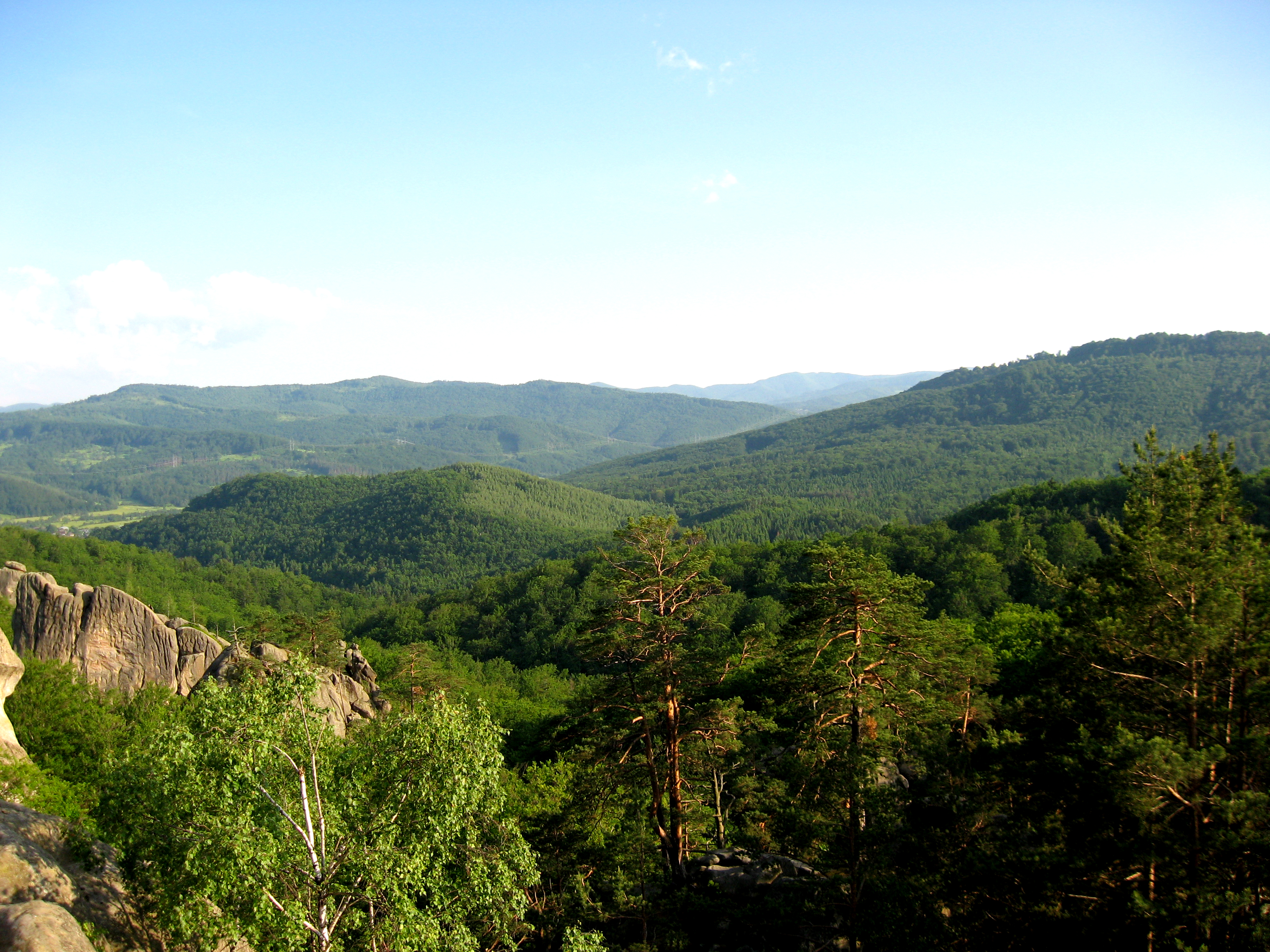 «Скелі Довбуша», Долинський район, Поляницьке лісництво, кв. 9,14